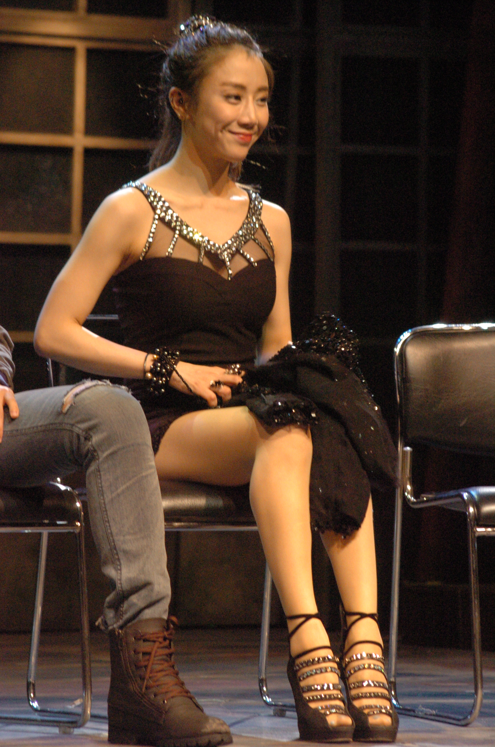 환상의커플 시즌2